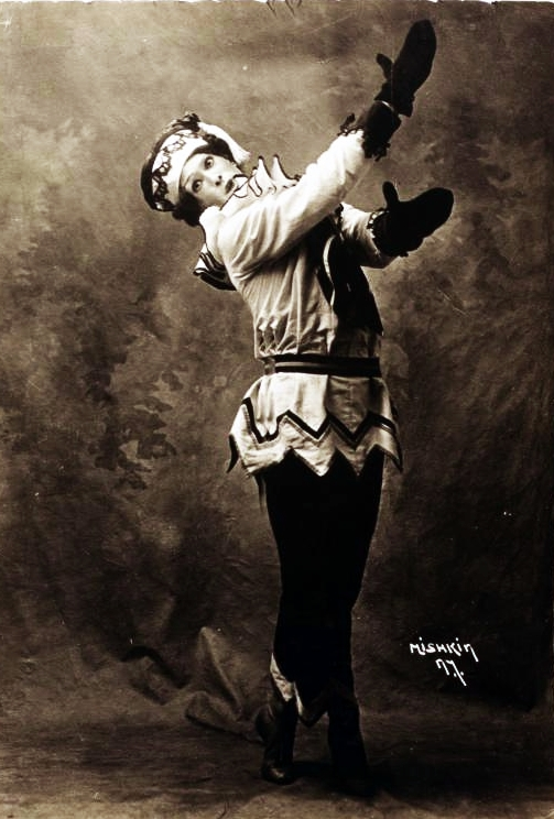 Nijinski als Petruschka